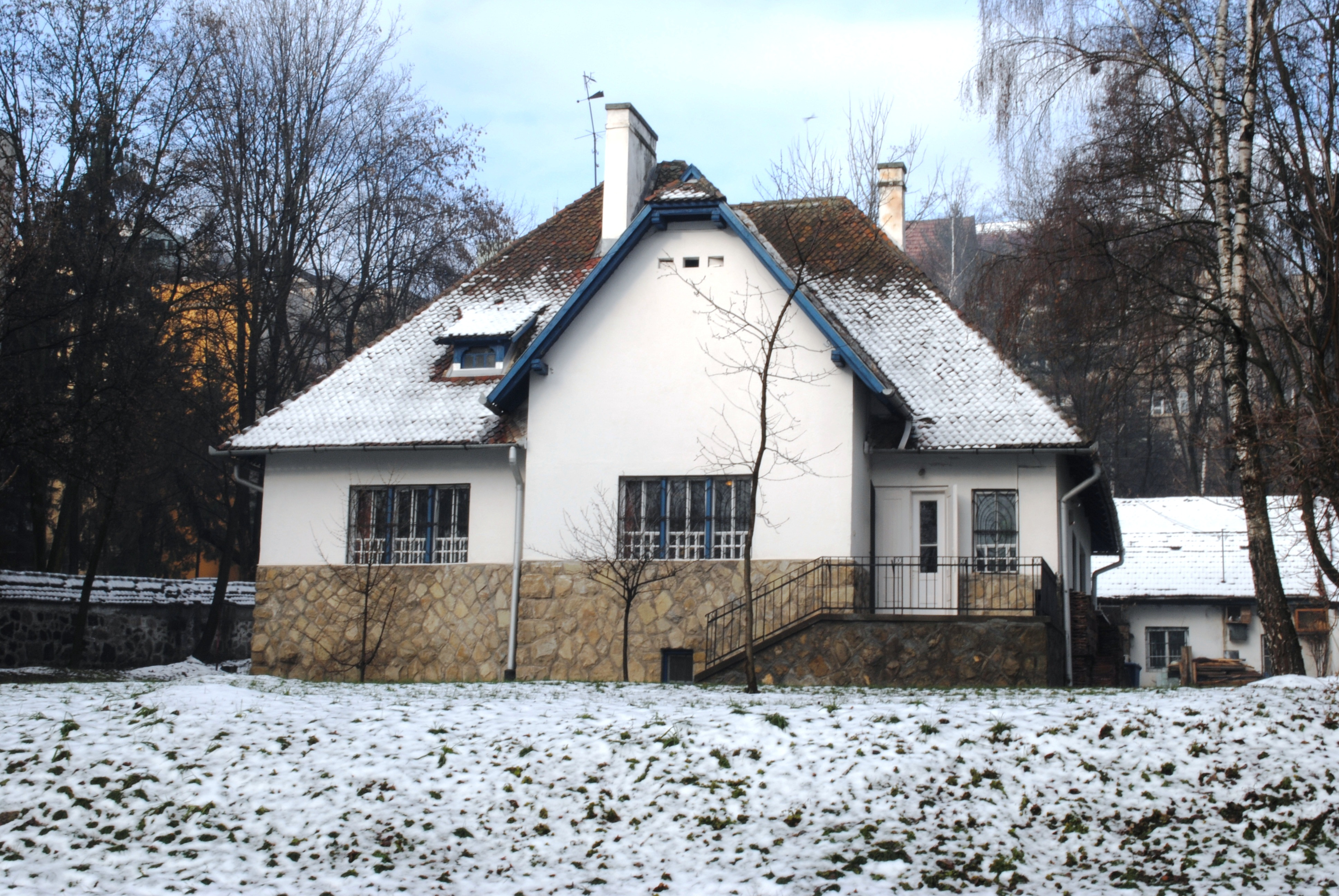 Ansamblul Muzeului Național Secuiesc, 1911 - 1913